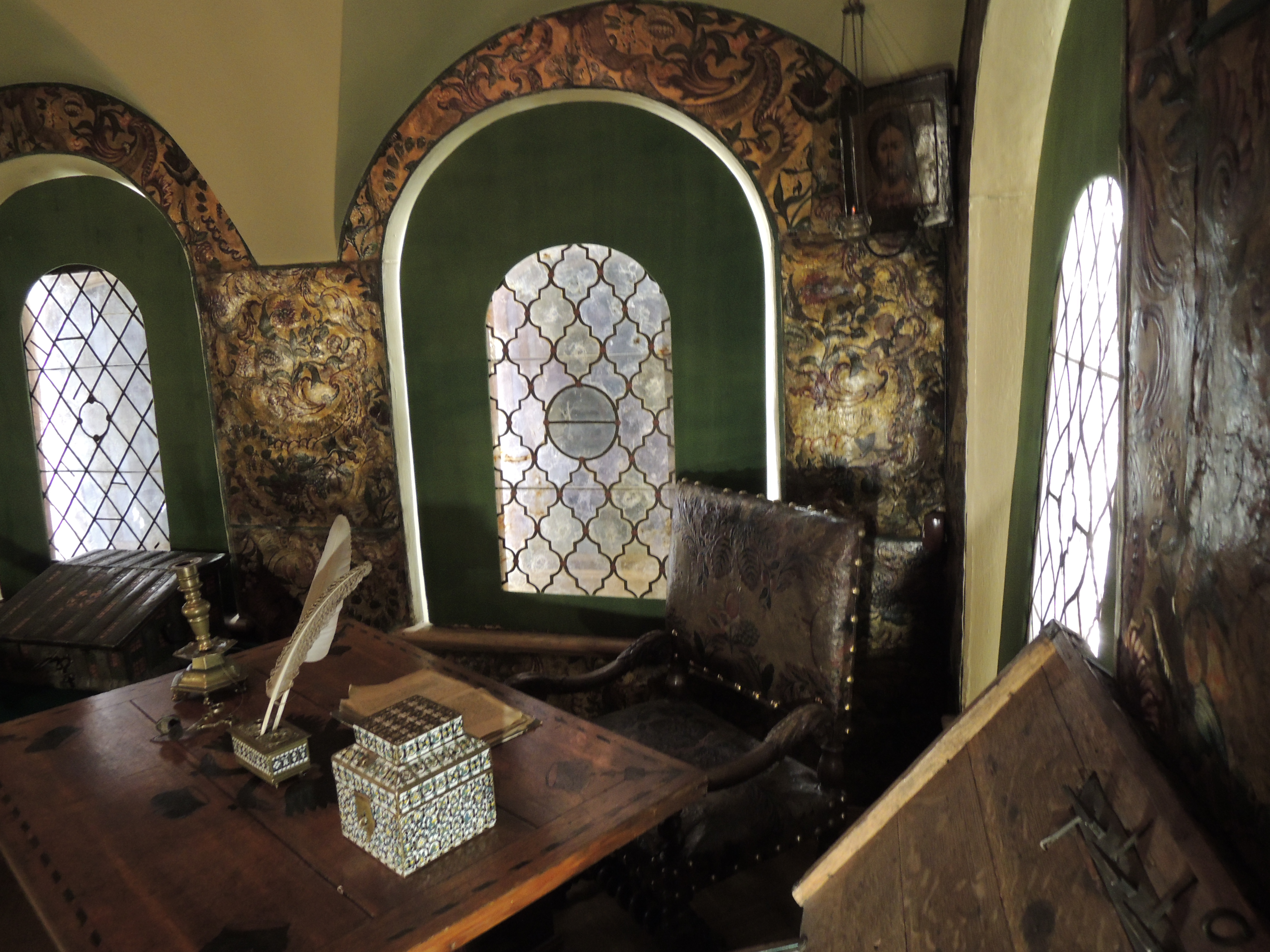 Палаты Романовых